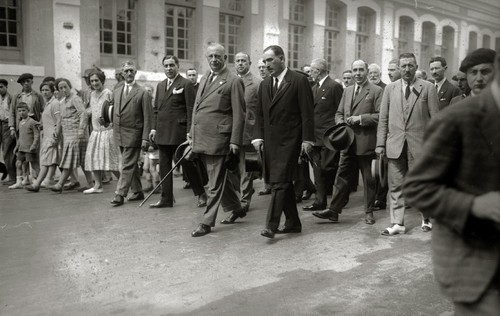 Miguel Primo de Rivera jenerala Errenterian. 1928.